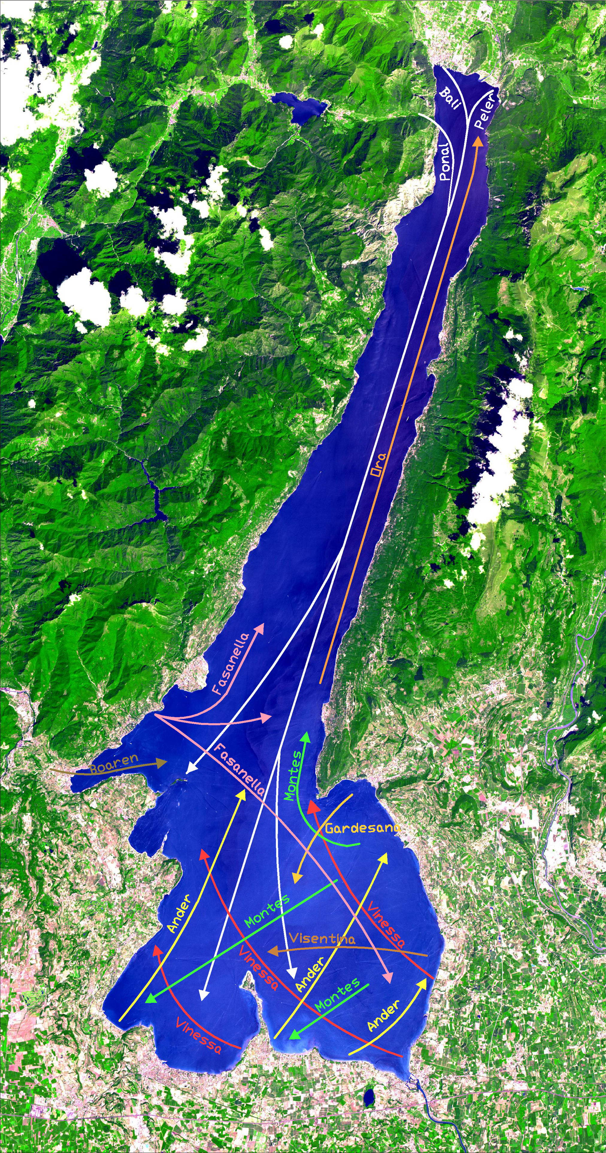 Immagine di pubblico dominio da me ottenuta aggiungendo la dicitura dei venti del Lago di Garda all'immagine satellitare di pubblico dominio della Nasa di cui riporto le seguenti informazioni: (indirizzo prelievo immagine) (descrizione) (JPL Image Use Policy ) Courtesy NASA/JPL-Caltech.